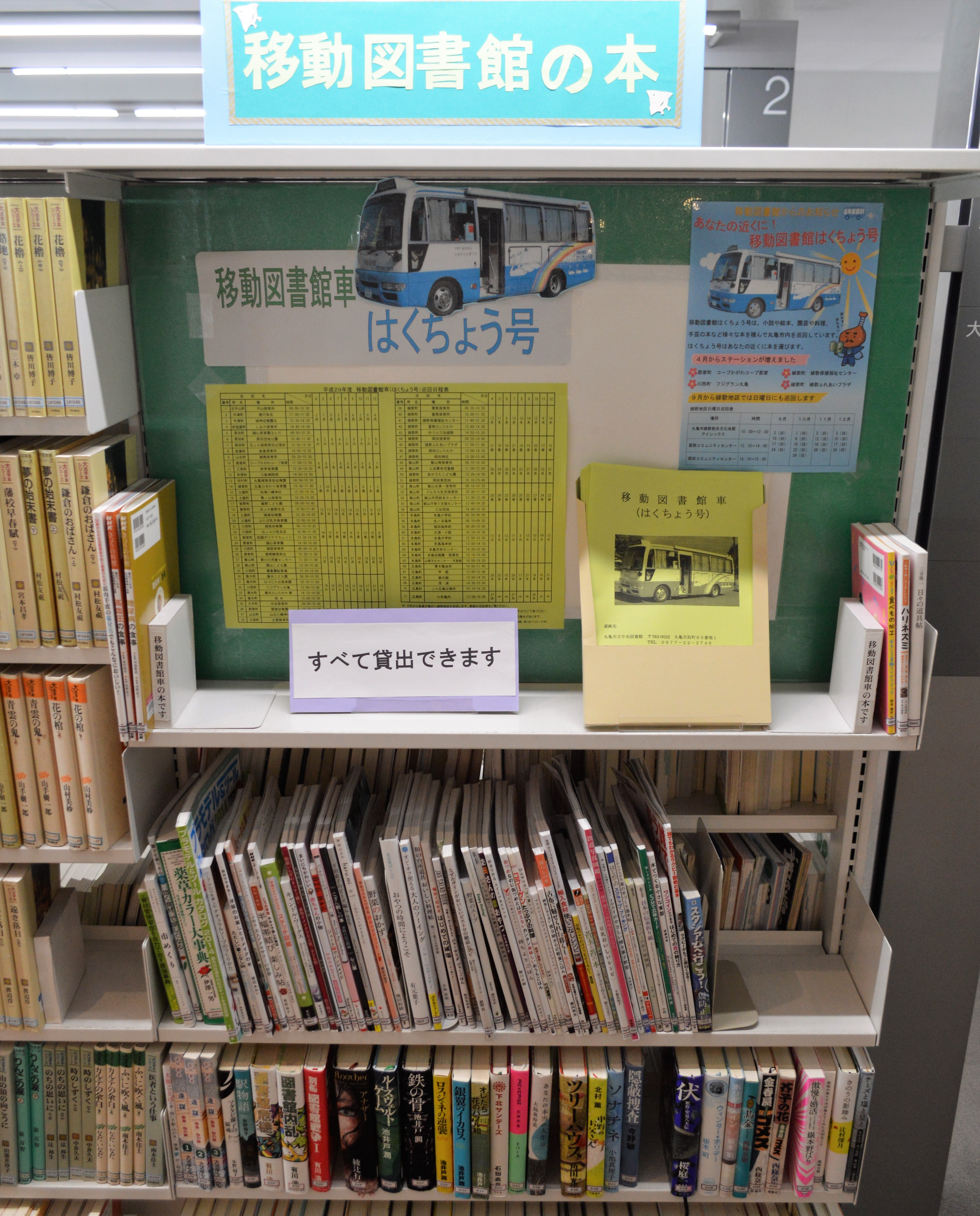 丸亀市立中央図書館。移動図書館の説明。